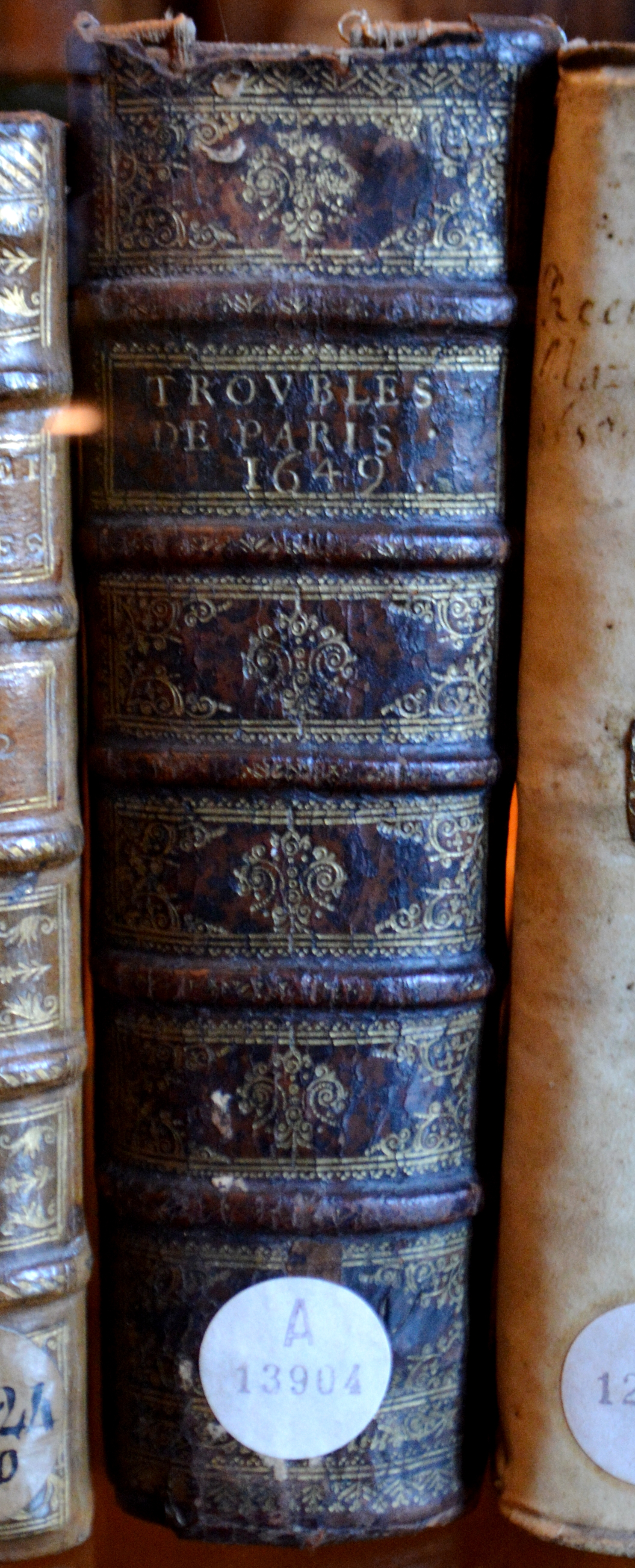 Tranche du livre "Troubles de Paris 1649" conservé à la Bibliothèque Mazarine, à Paris.